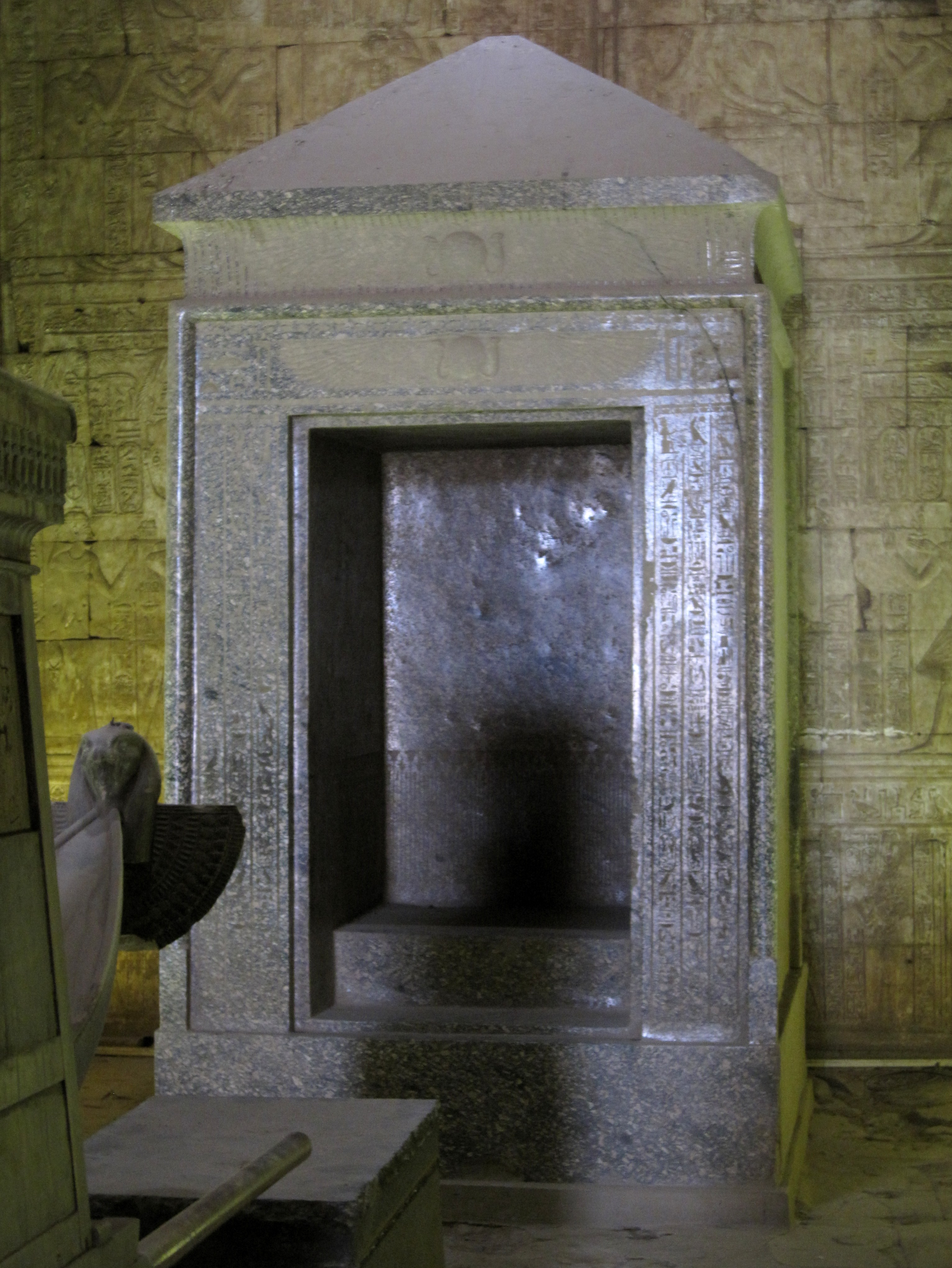 Heiligtum im Tempel von Edfu, Ägypten